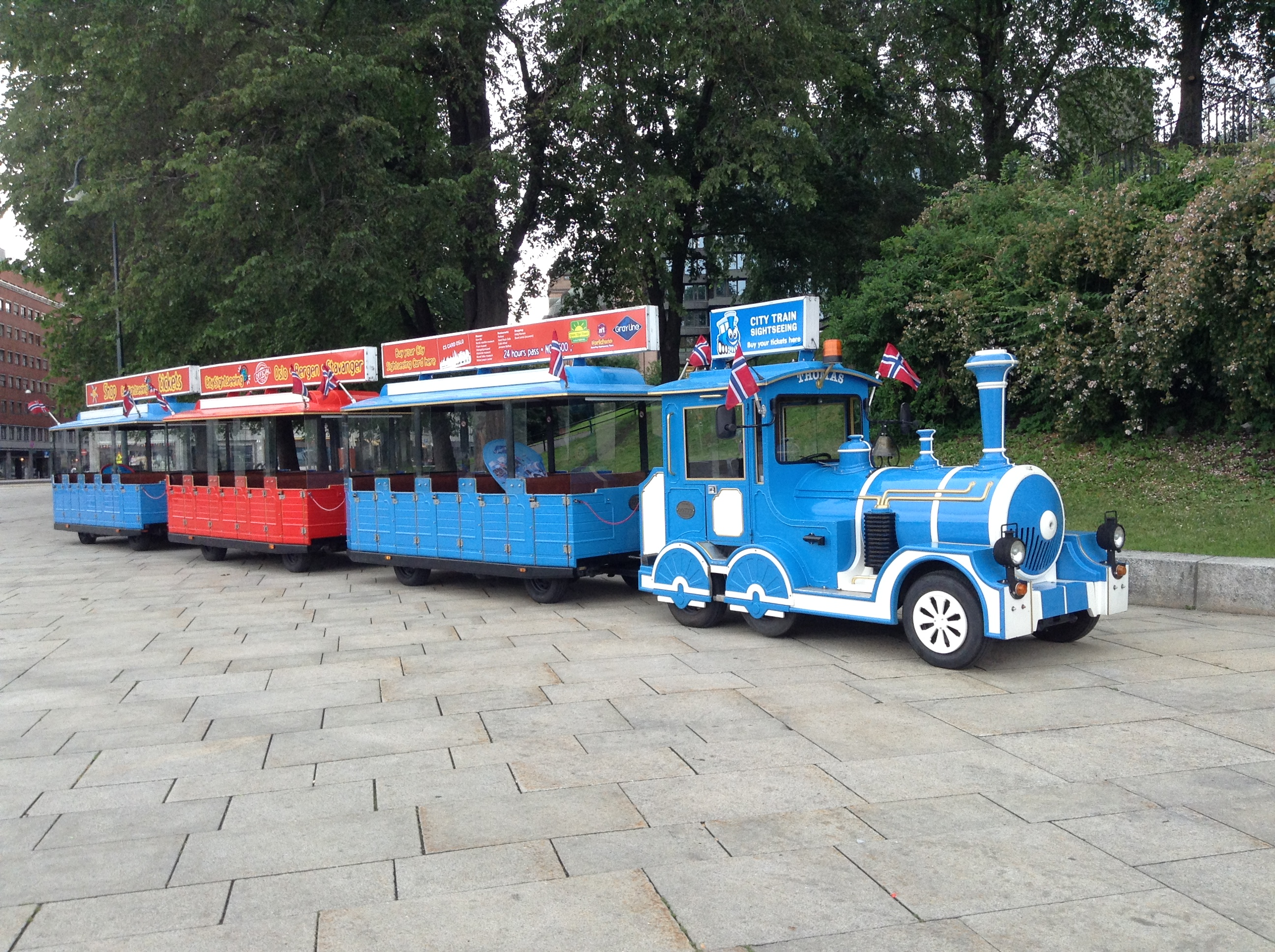 Oslo, Noruega